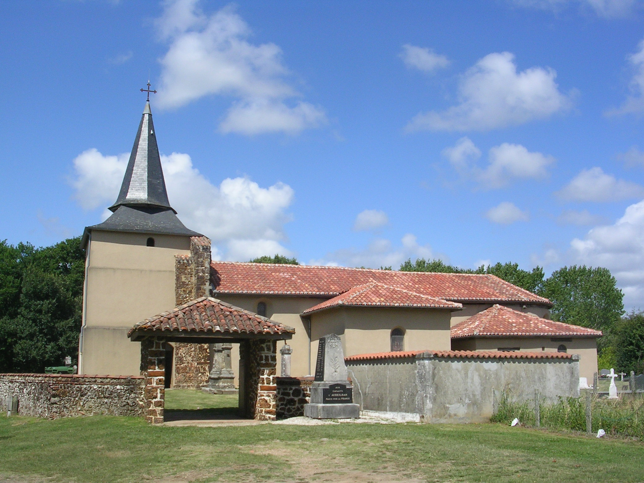 Église Sainte Ruffine d'Aureilhan, dans le département français des Landes